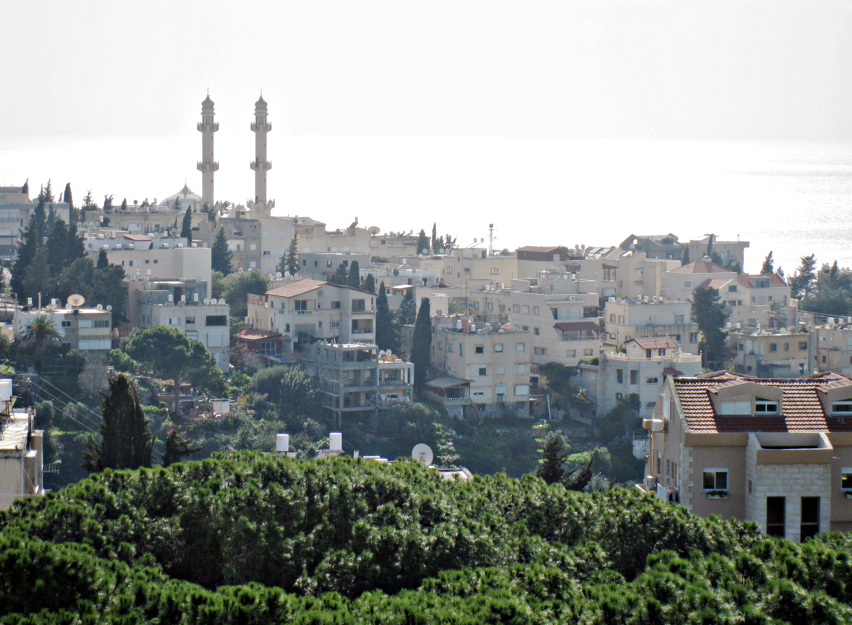 Har HaCarmel Hotel מלון הר הכרמל